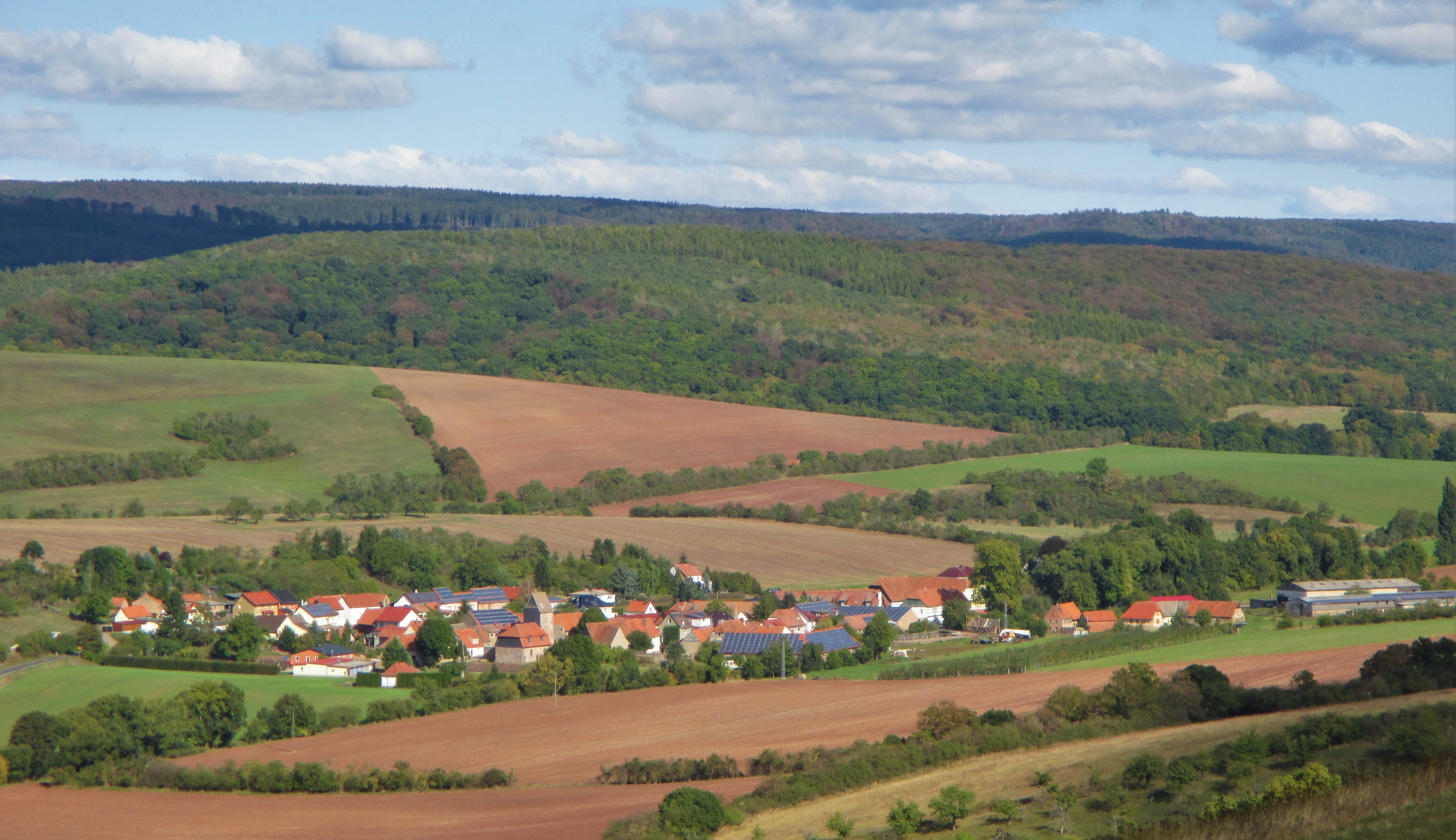 Blick von Südwesten auf Drebsdorf, Gemeinde Südharz, Landkreis Mansfeld-Südharz